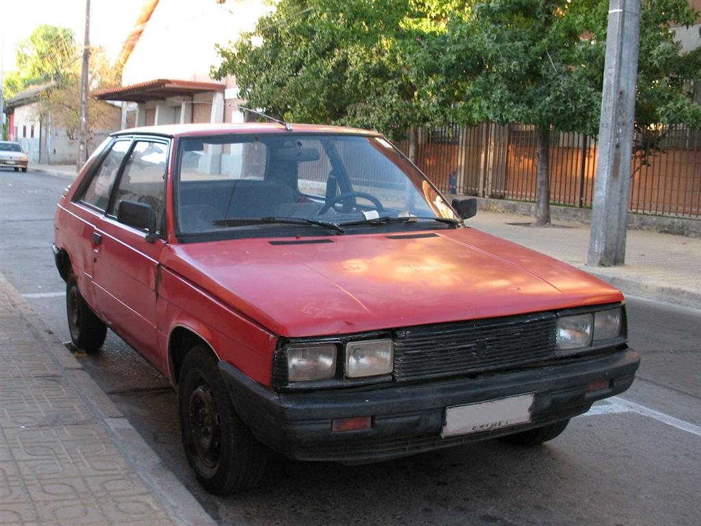 Renault 11 TC Encore 1985